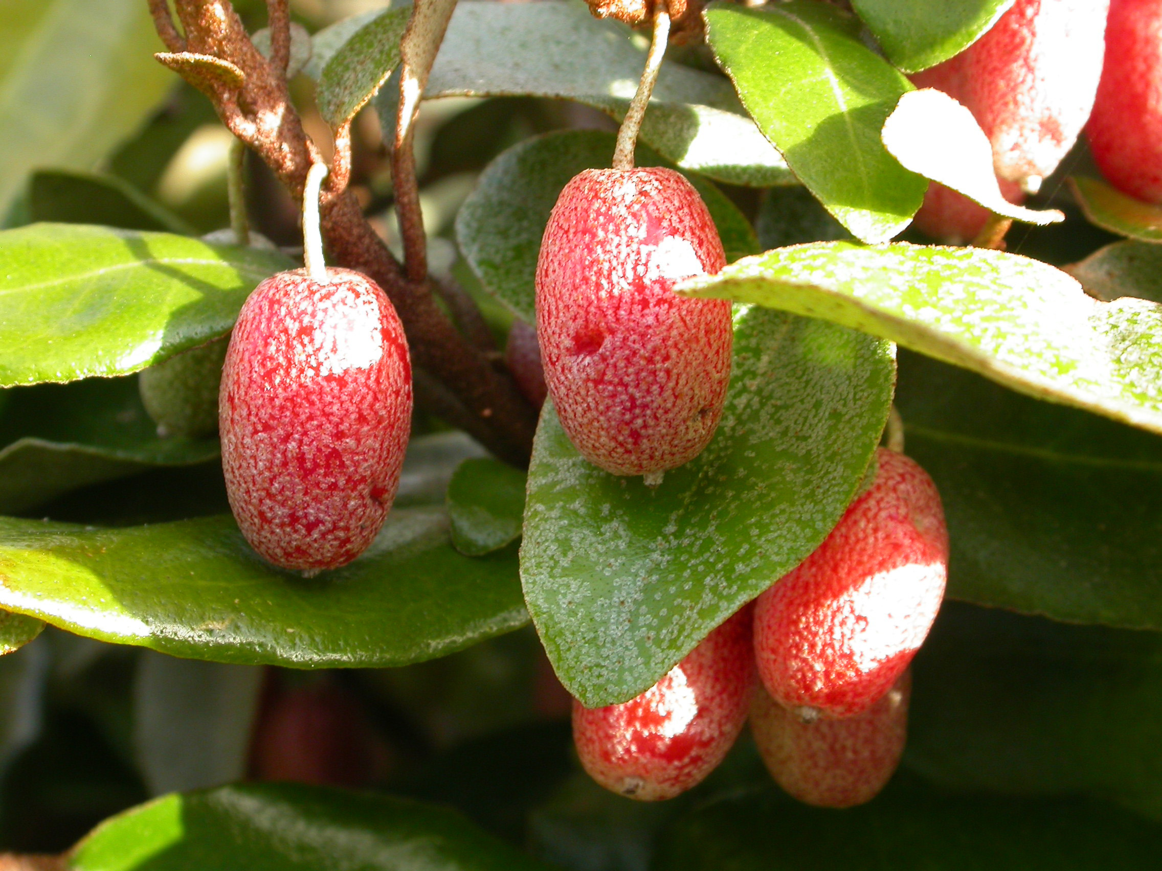 Fruits rouges d'Elaeagnus